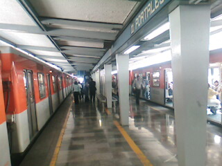 Imagen de la estacion portales